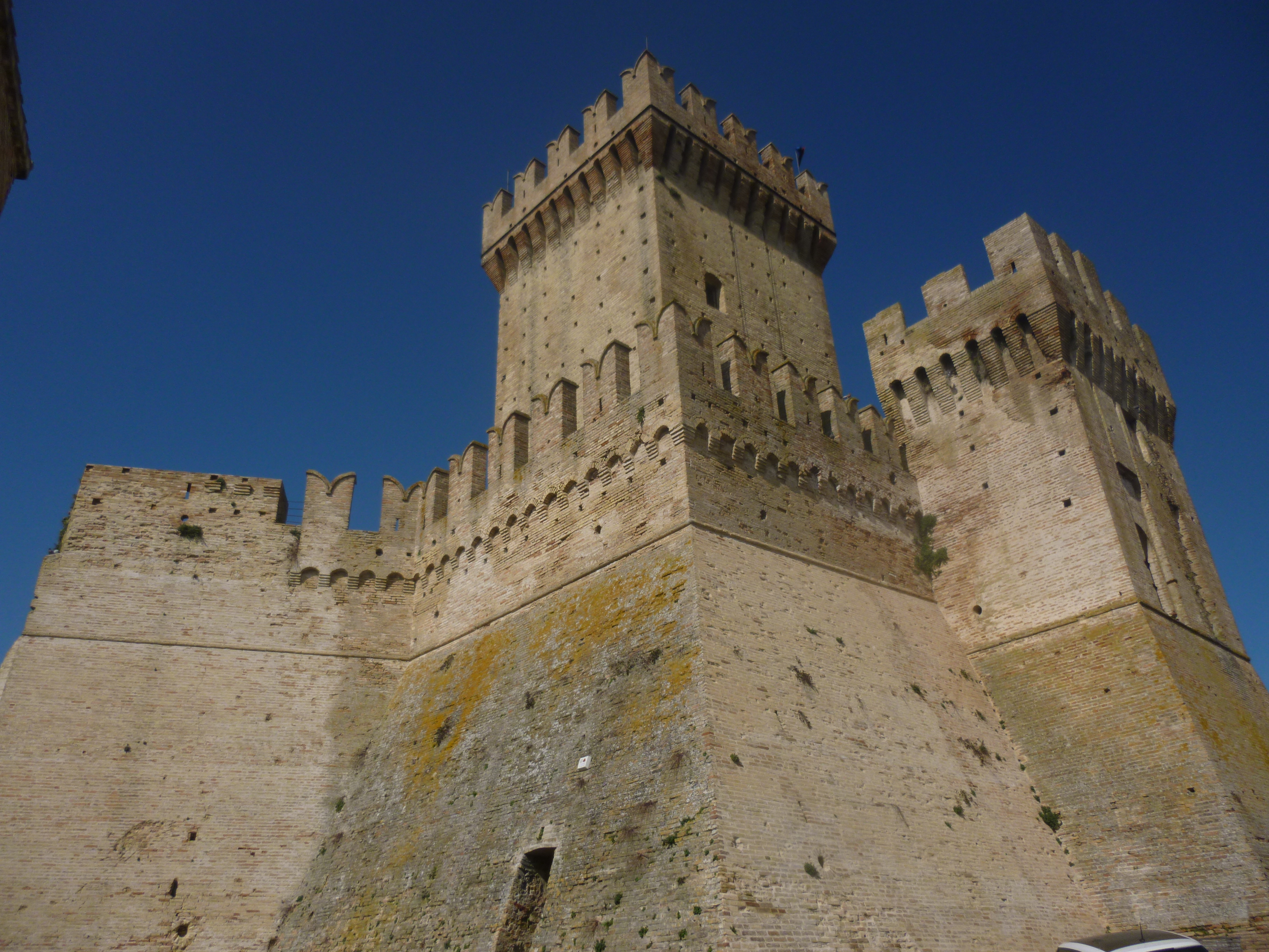 Rocca medievale This is a photo of a monument which is part of cultural heritage of Italy.